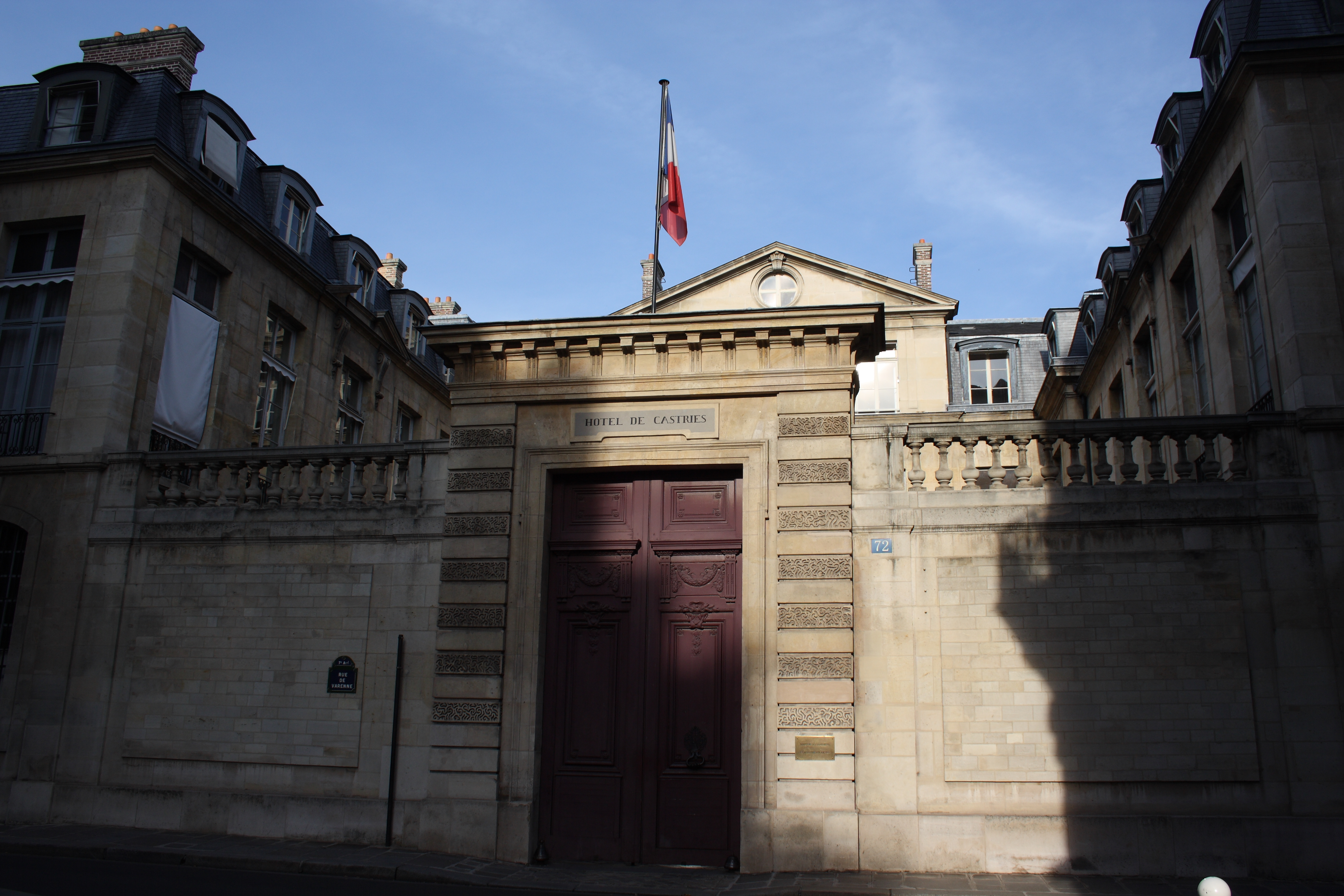 Hôtel de Castries in Paris (7. Arrondissement), 72 rue de Varenne